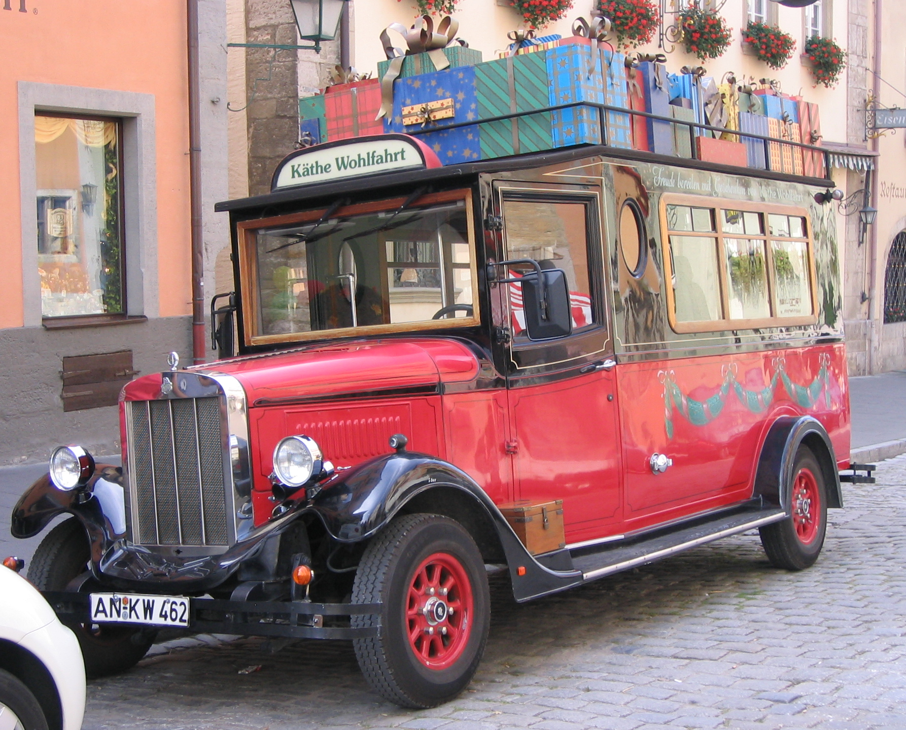 Oldtimer vor dem Geschäft Käthe Wohlfahrt in Rothenburg ob der Tauber